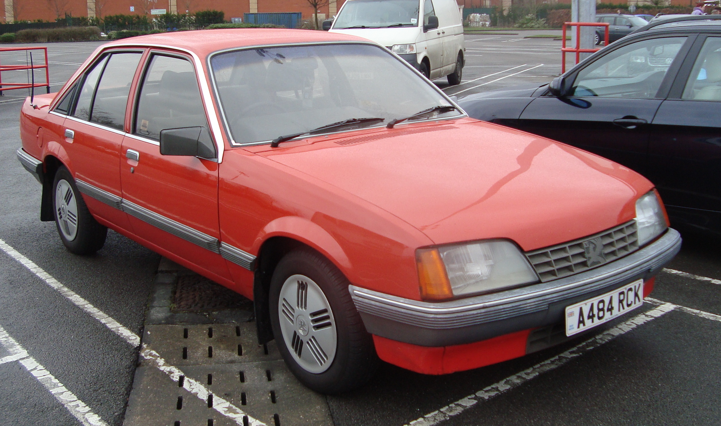 1984 Vauxhall Carlton 2000 L